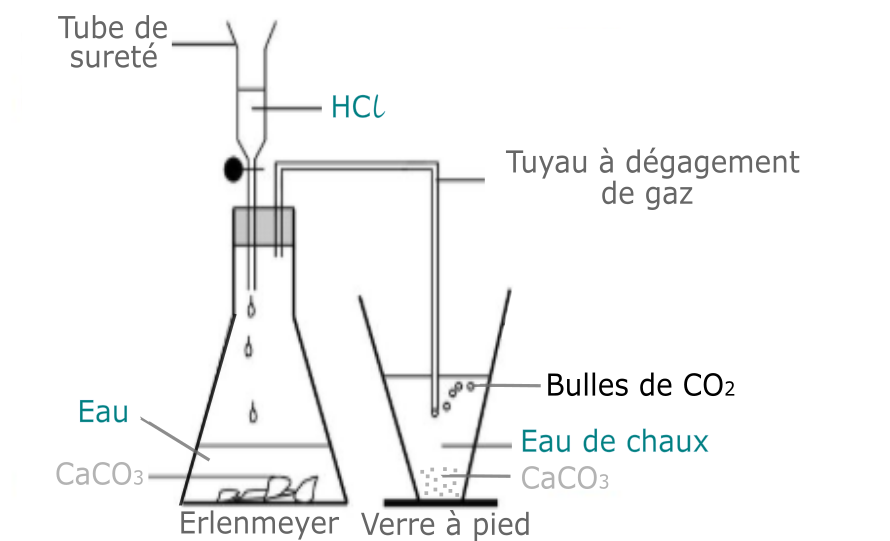 Expérience de dissolution-précipitation du calcaire. L'acide chlorydrique dilué dissout le calcaire (carbonate de calcium), ce qui produit beaucoup de bulle de gaz de dioxyde de carbone qui trouble l'eau de chaux, phénomène correspondant à une précipitation de carbonate de calcium